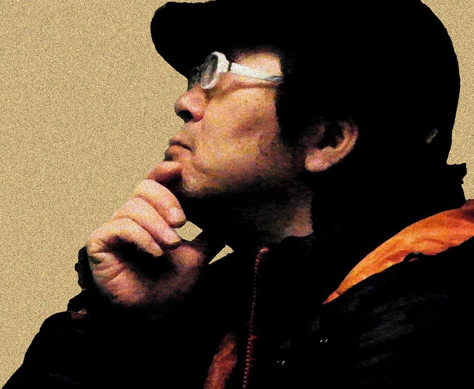 Vienna - Ayankoko meets reformART - 'Kazuhisa Uchihashi, just listening'